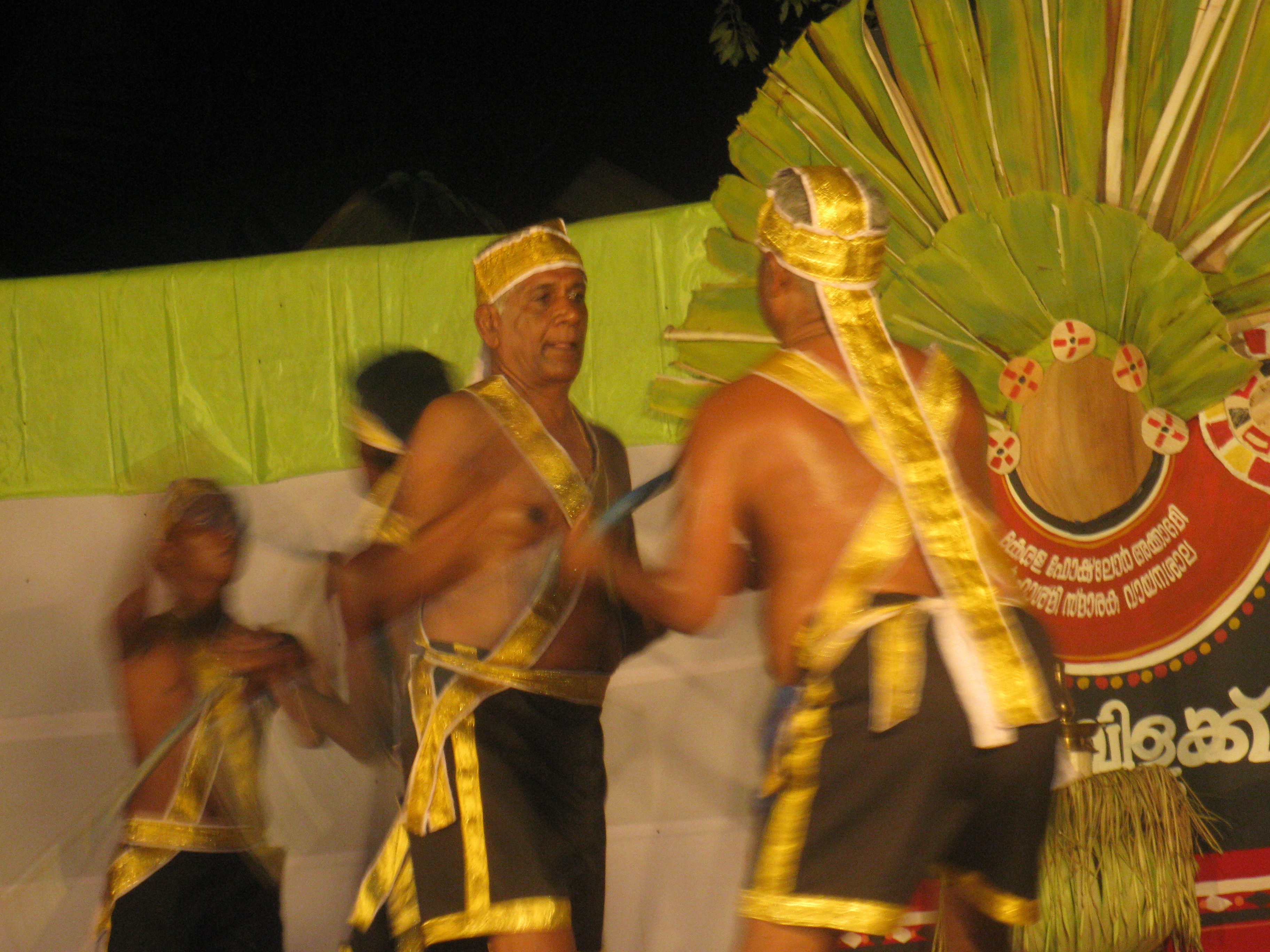 കണ്യാർ കളി അവതരിപ്പിക്കുന്ന സംഘം